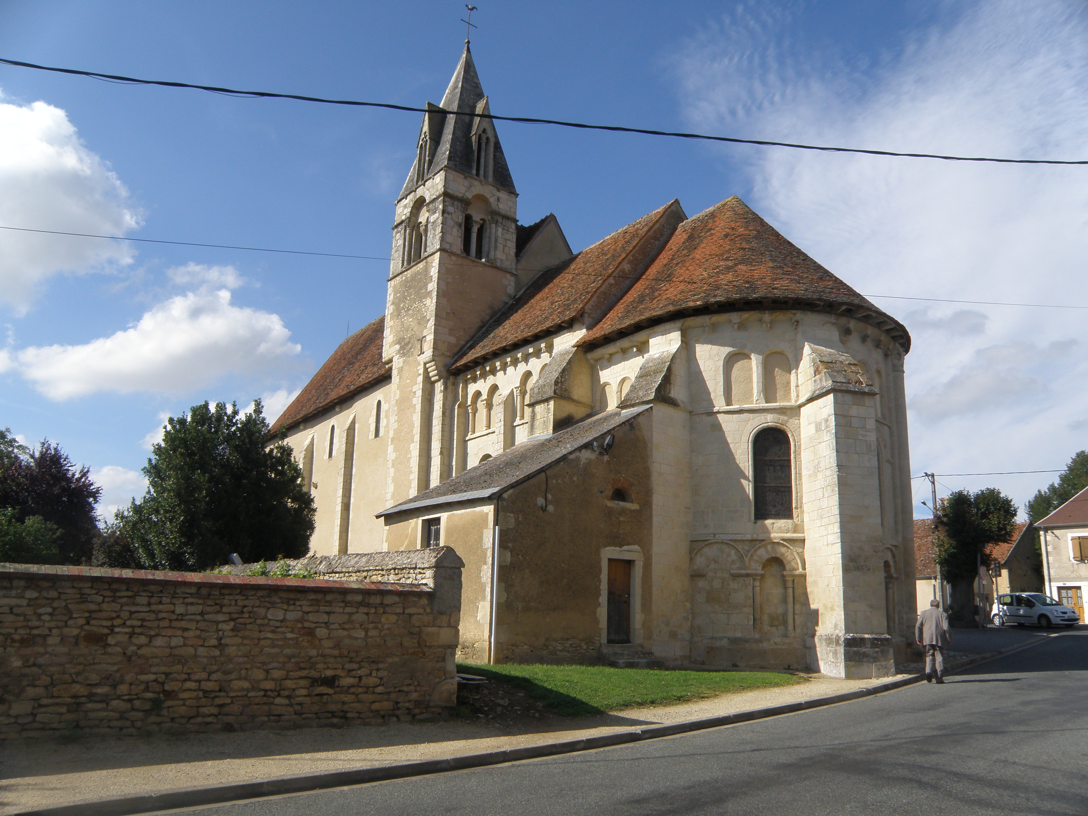 Église de Chalivoy-Milon, vue du sud-est